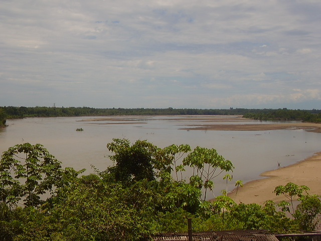 Rio Caqueta